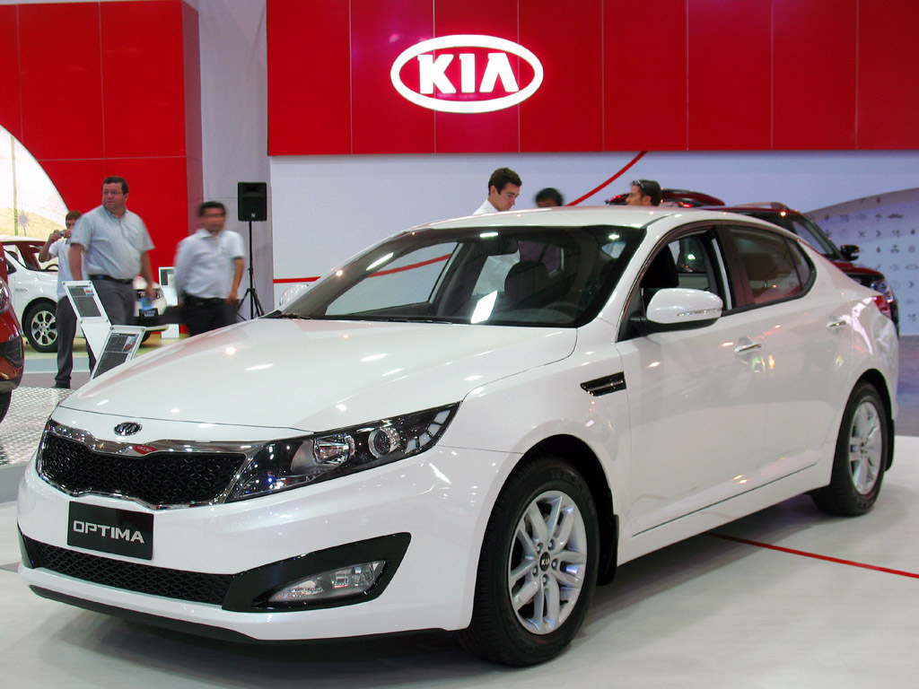 Kia Optima EX 2011